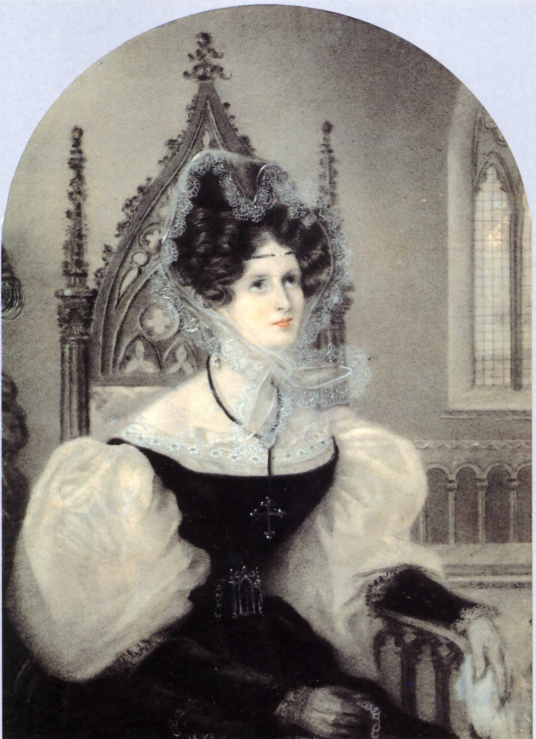 Портрет княгини З.А.Волконской (Данс и Амели Ромилли, 1831), ГМП